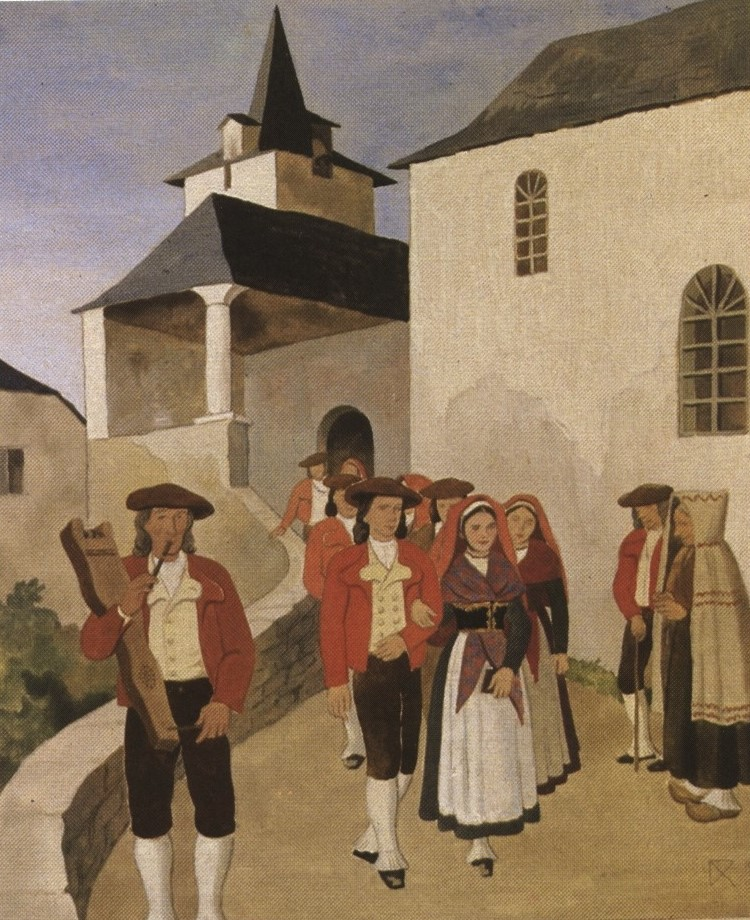 Vallée d'Ossau : Noces ossaloises / Arrue, Ramiro (1892-1971)